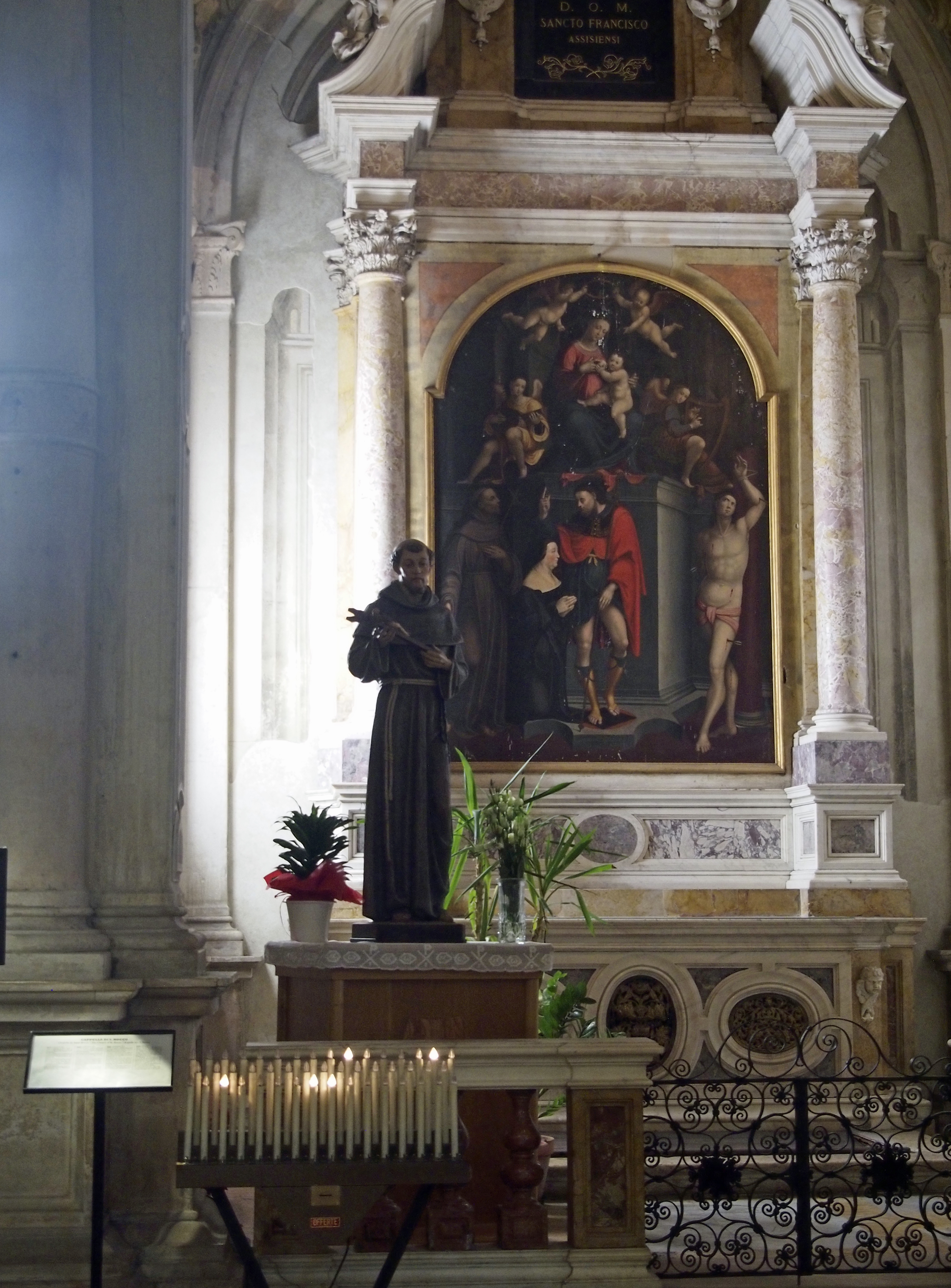 Ein Seitenaltar in der Basilica di San Francesco in Ravenna